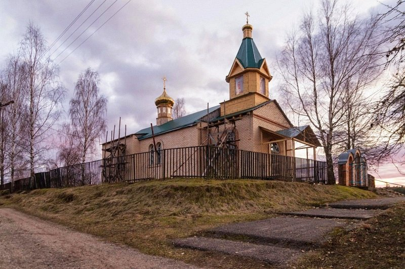 Рэчкі. Свята-Духаўская царква